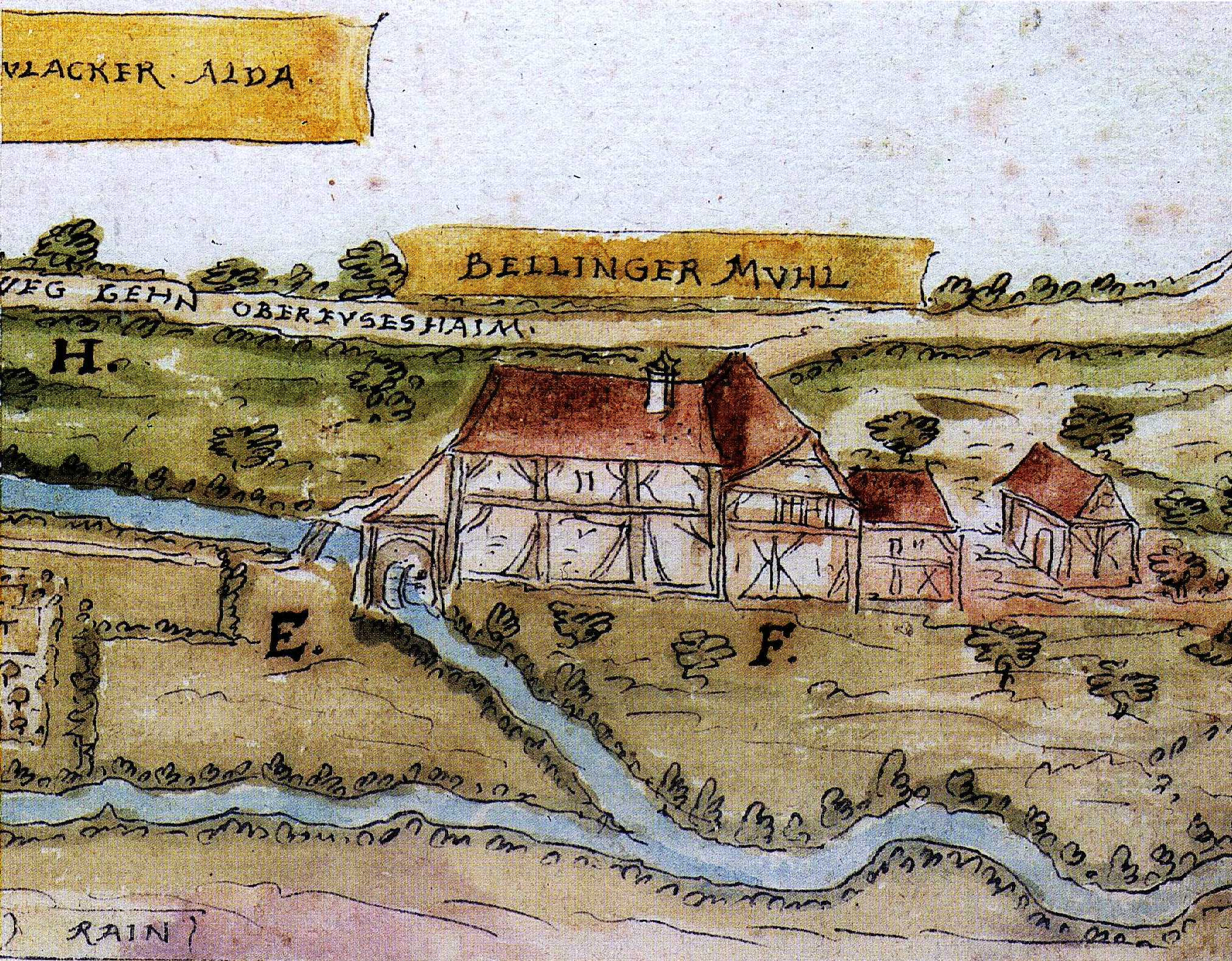 Die Böllinger Mühle in Neckargartach. Lavierte Federzeichnung im Lagerbuch des Heilbronner Katharinenspitals von 1619 (Ausschnitt)